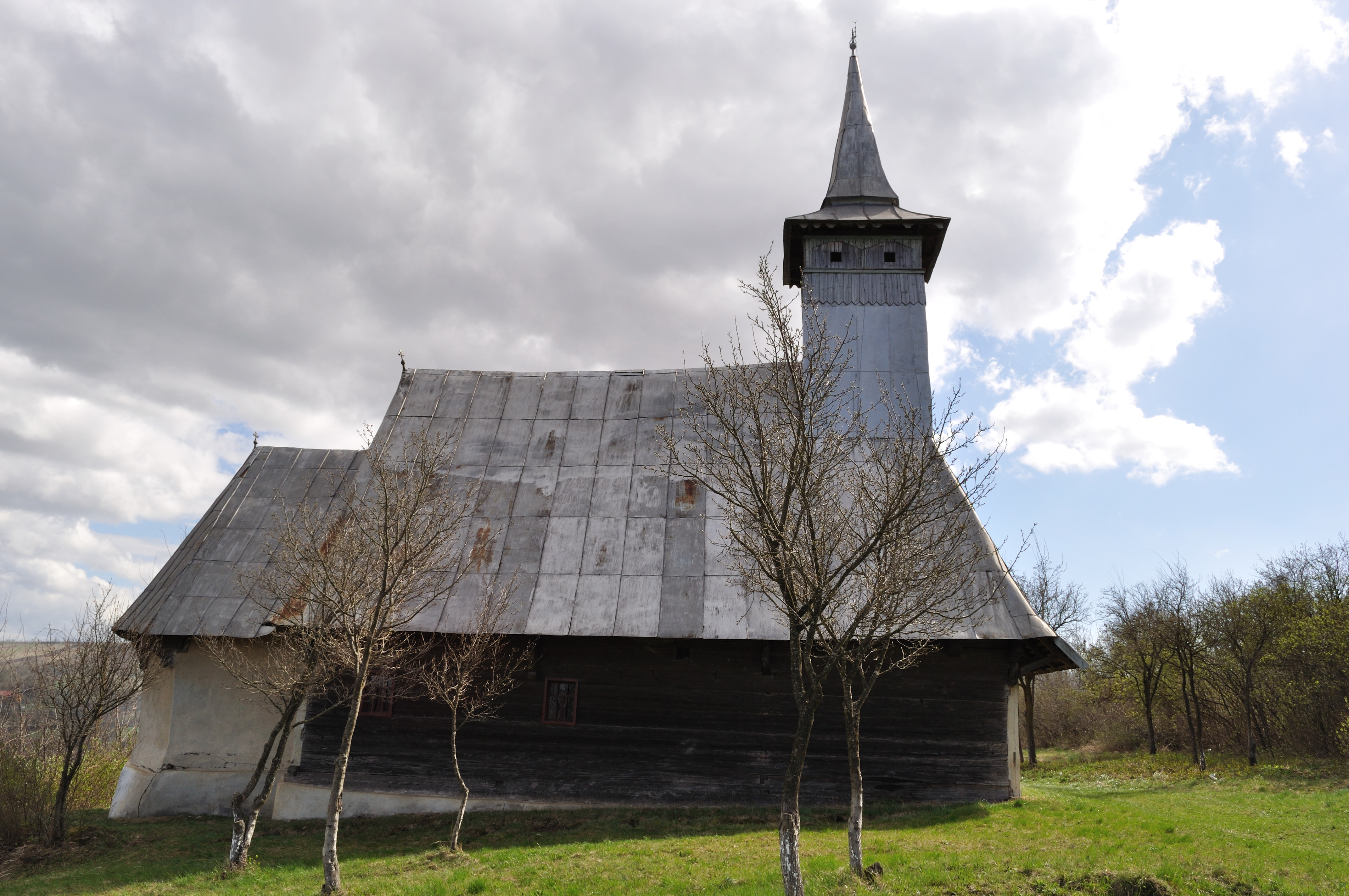 Biserica de lemn „Sfântul Nicolae” din Bădeni, județul Cluj